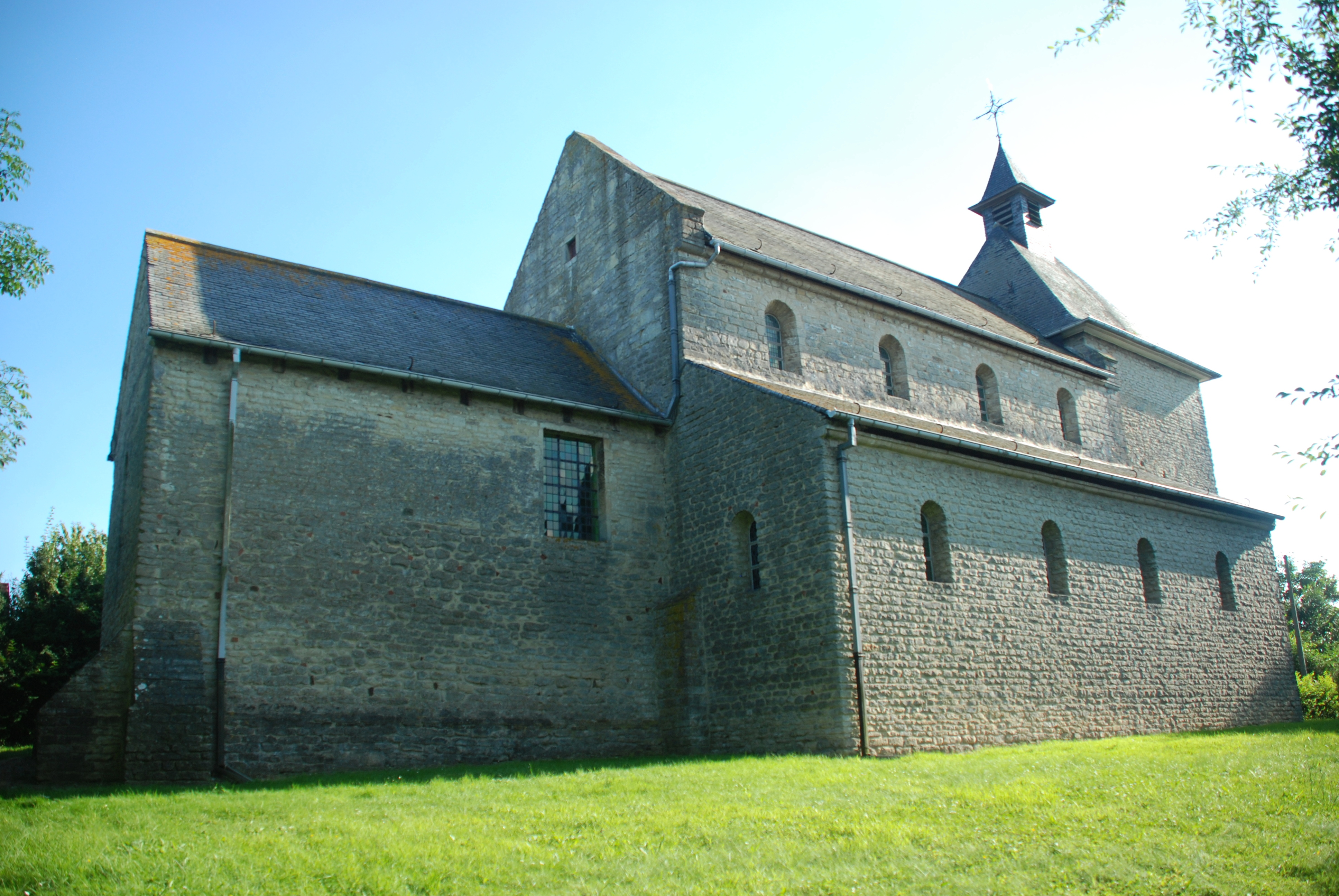 Belgique - Brabant flamand - Chapelle Sainte-Vérone de Leefdaal